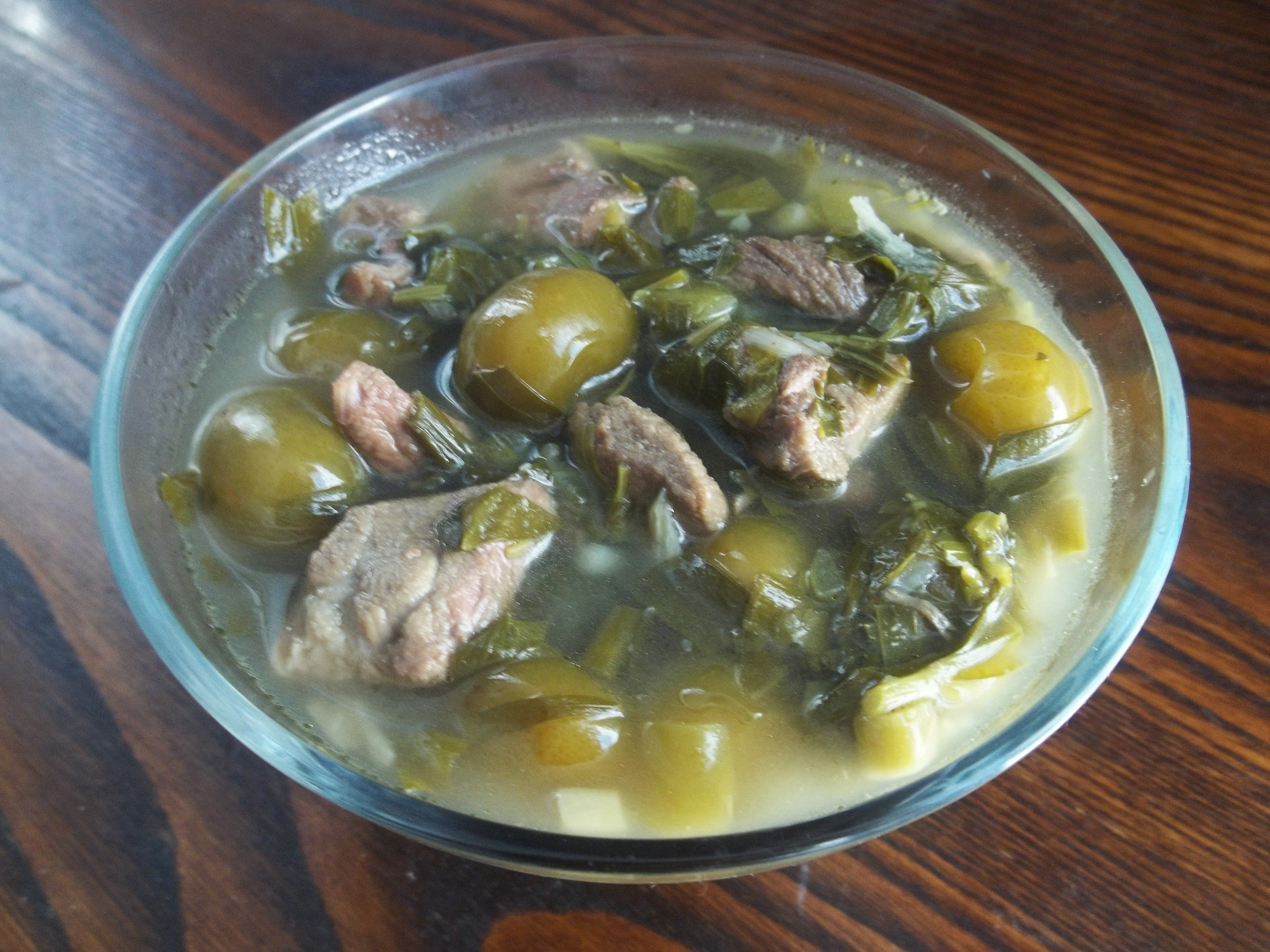 Чакапули